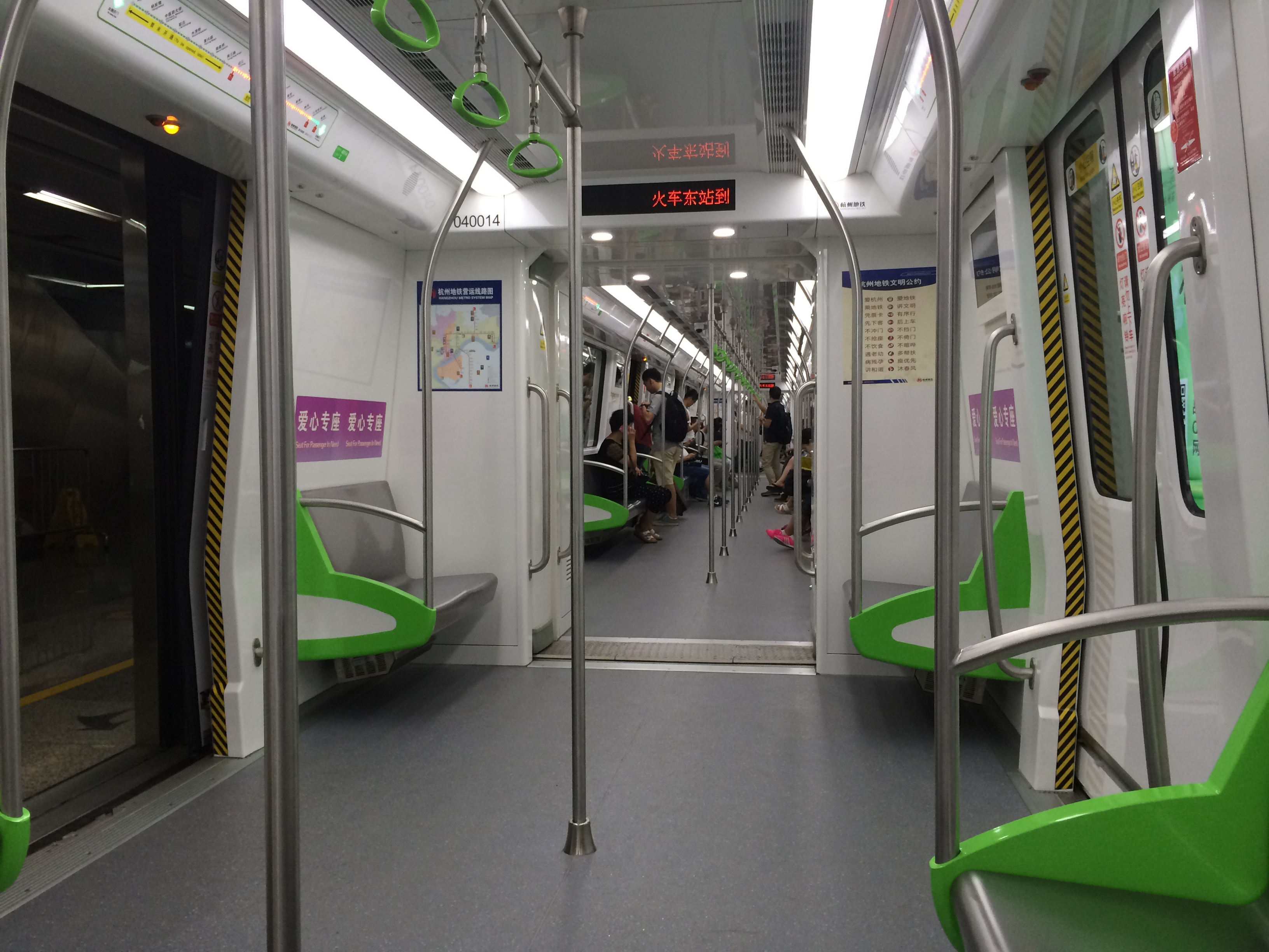 4号线列车内部